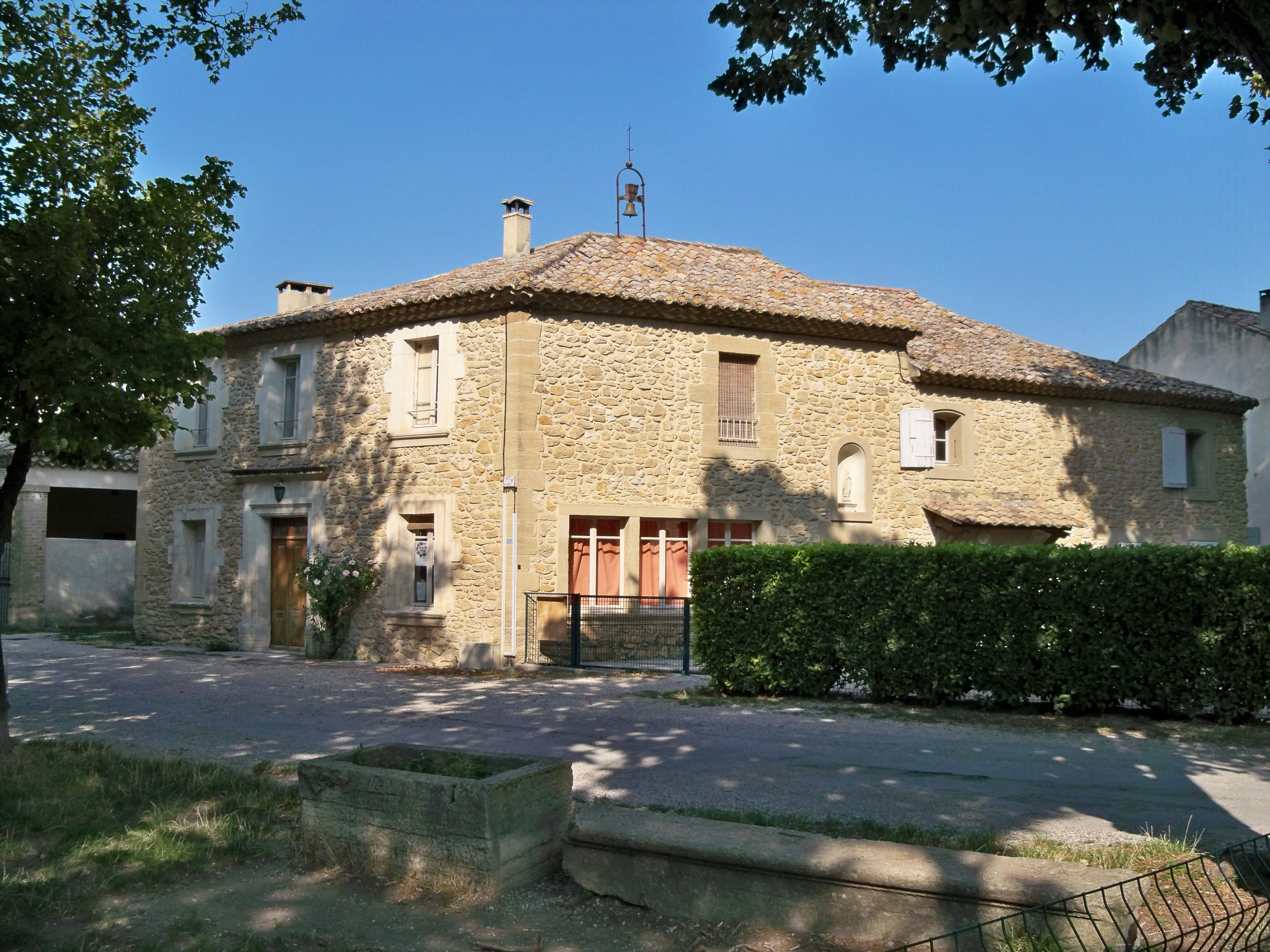 Terre de Causanscommuns, église, presbytère, cour, jardin, parc, clôture, portail, maison, élévation, Route de Violès (Inscrit, 1997) .